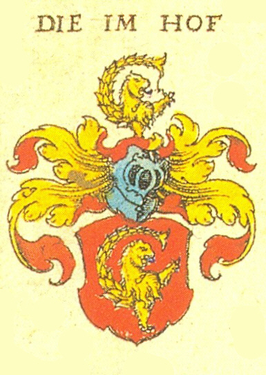 Wappen der Nürnberger Patrizierfamilie Imhoff